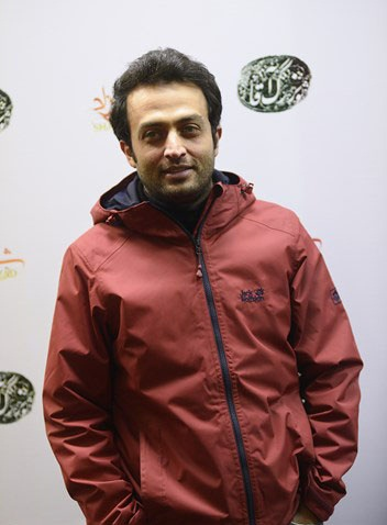 مصطفی زمانی